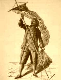 Grabado del comunero Francisco de Medina